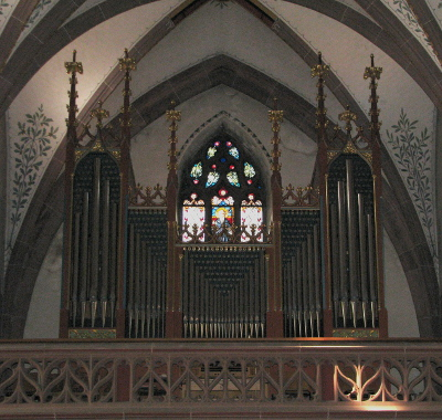 St.-Ägidius-Kirche in Höpfingen.